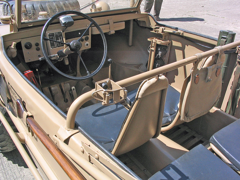 Beschreibung: VW Schwimmwagen / Innenraum / Interior Fotograf: Darkone, 2. Juli 2005